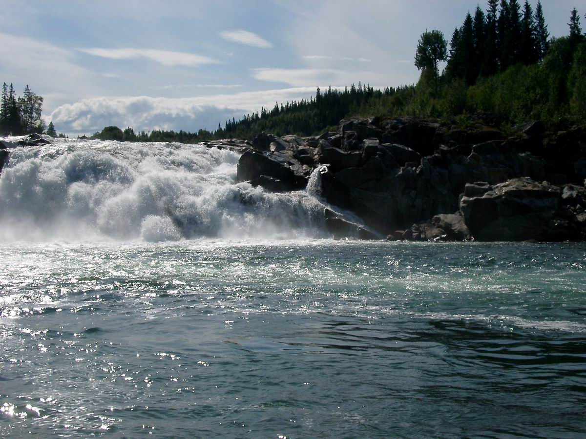 zwischen Mo i Rana & Trondheim-Laksforsen